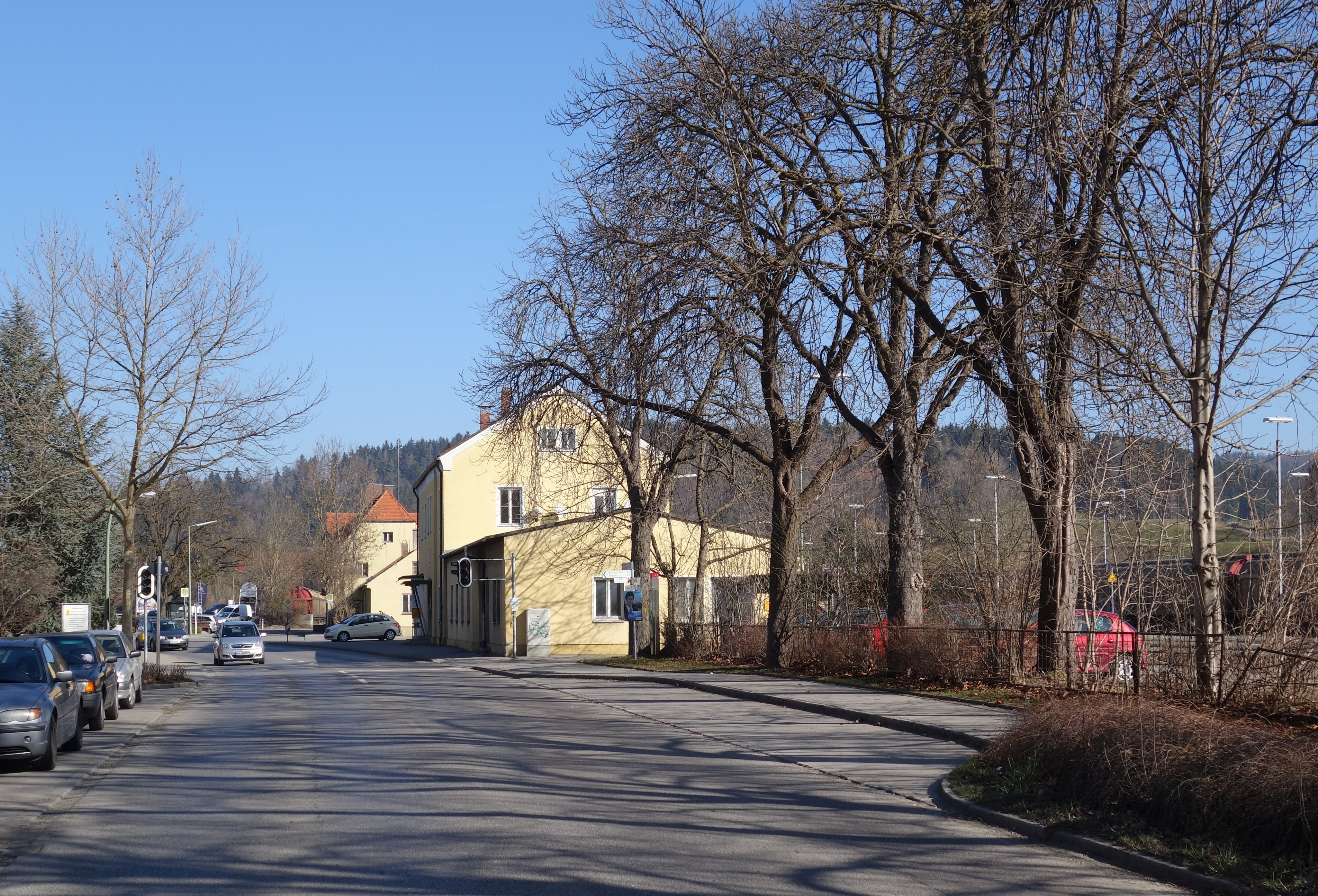 Schongau Bahnhofstraße mit Empfangsgebäude Blickrichtung Norden, links hinter dem Empfangsbegäude das Gebäude der früheren Bahnmeisterei